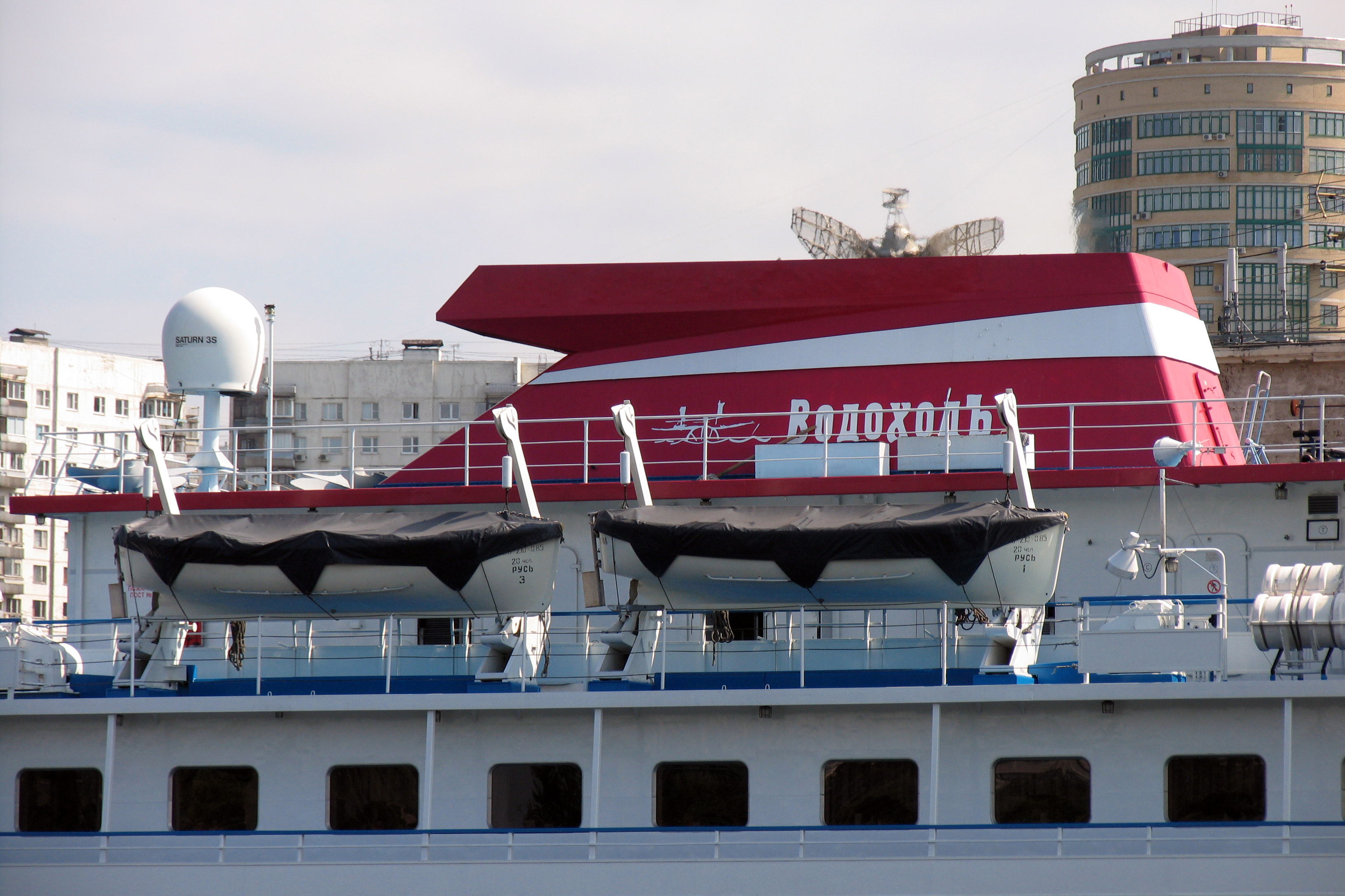 Теплоход "Русь" на Химкинском водохранилище.